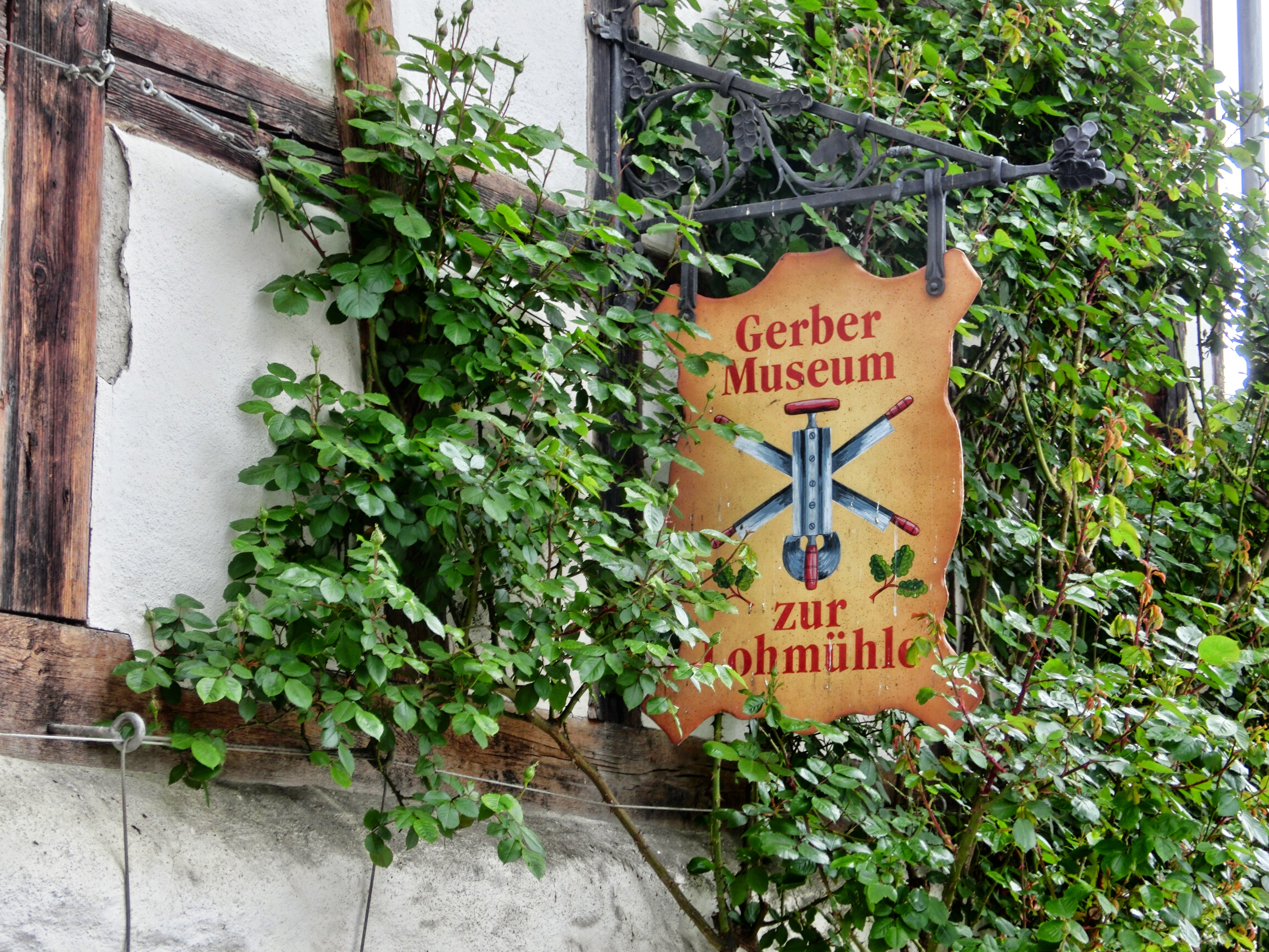 Deutschland (D) - Baden-Württemberg (BW) - Bodenseekreis (FN) - Frickingen: Lohmühle (Gerberei-Museum)